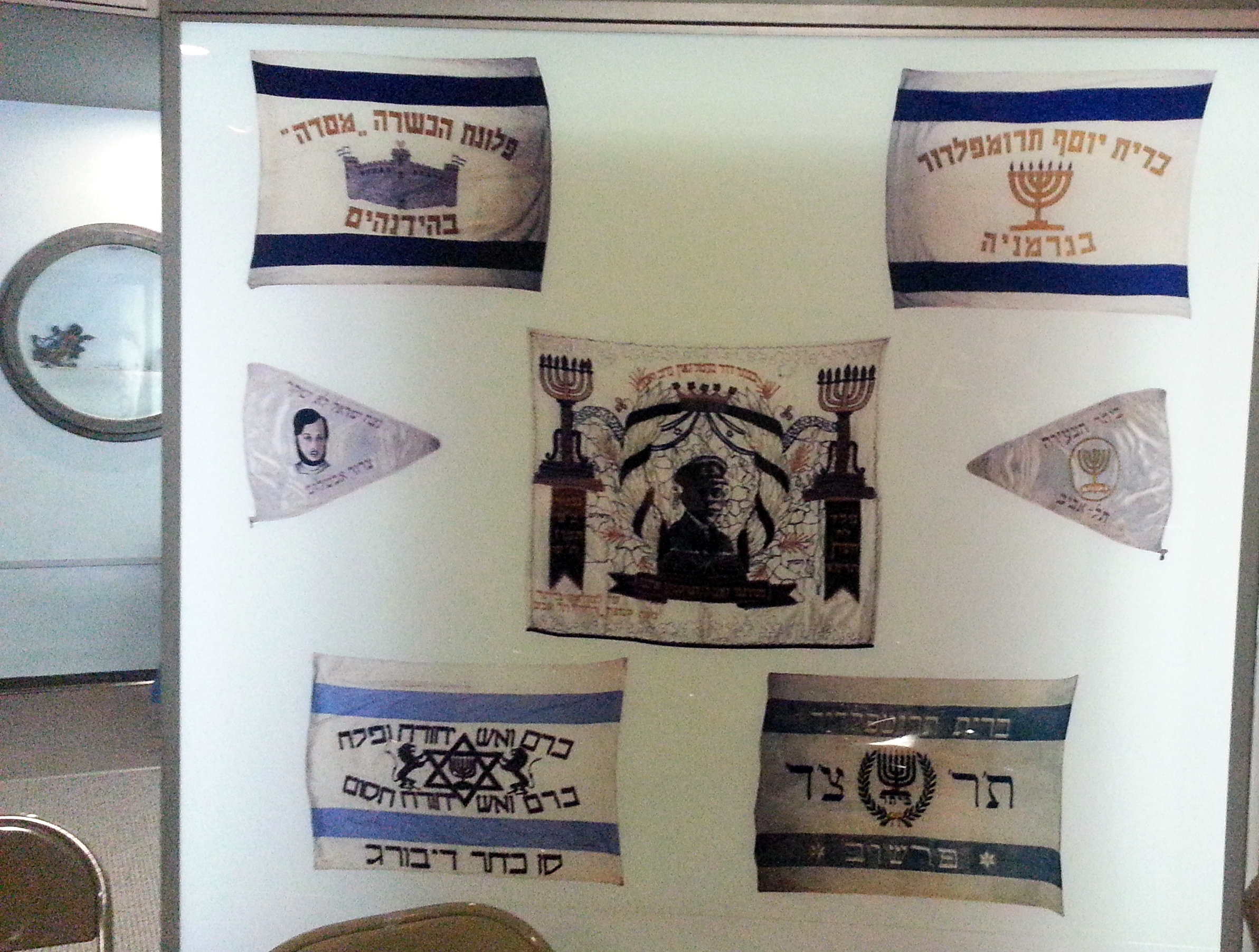 דגלי תנועת הנוער בית"ר מוצגים בתערוכת קבע במכון ז'בוטינסקי בתל אביב; בדגל השמאלי האמצעי - שהיה של צרור בית"ר על שמו של אבשלום פיינברג איש ניל"י - שובץ דימויו של אבשלום פיינברג